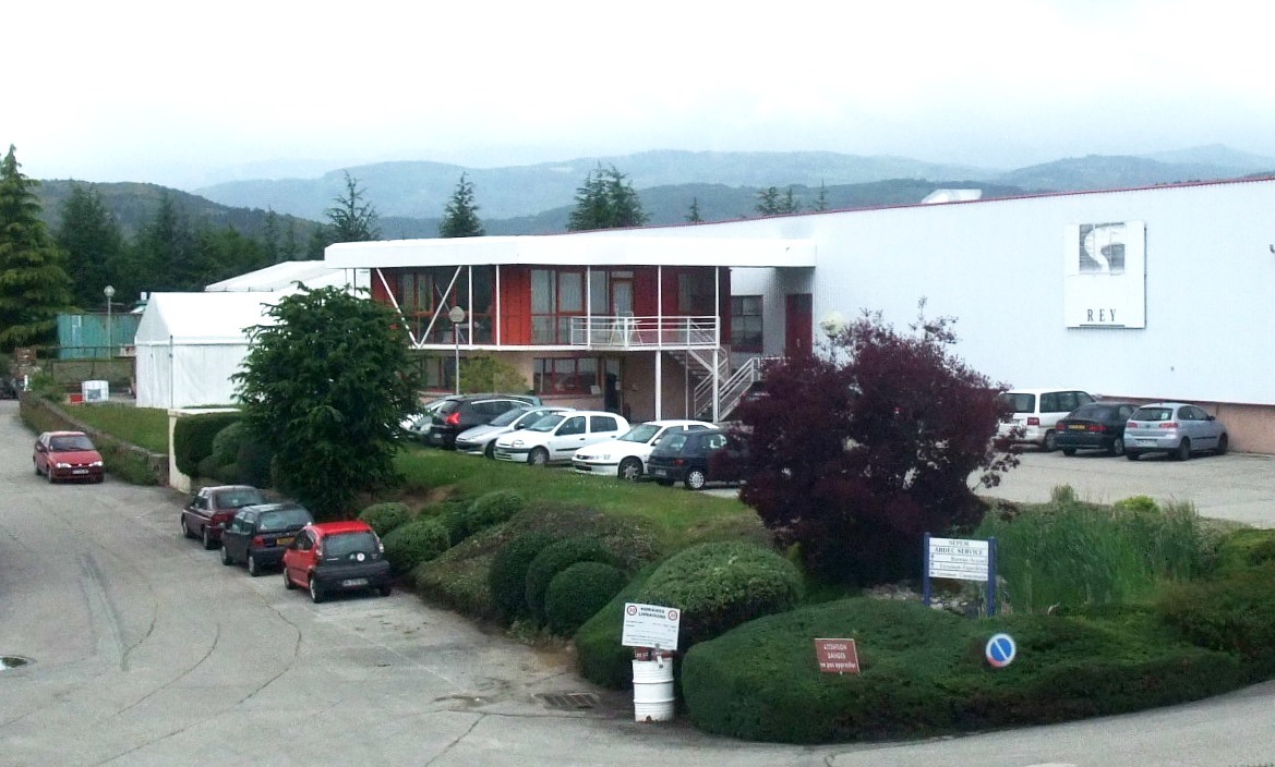 Boulieu demi-usine Sepem